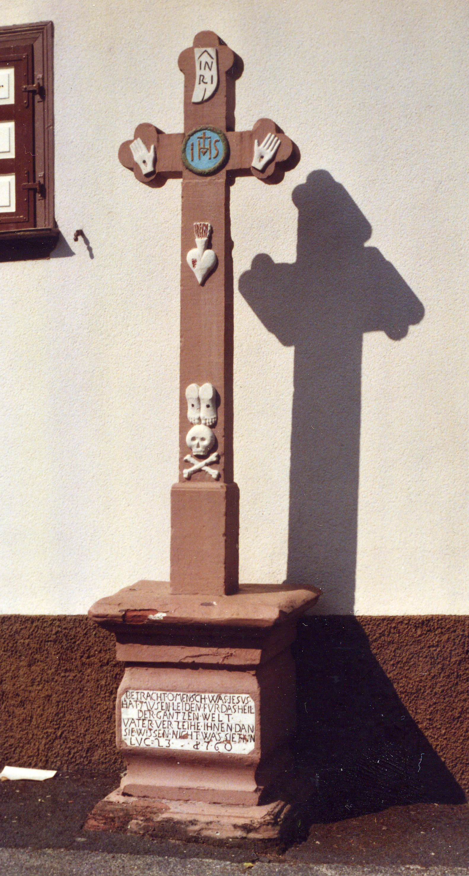 farbig gestaltetes Fünfwundenkreuz an der Hohlackerstraße in Gossersweiler, im Sockel Bibelzitat nach Lukas 23, 34